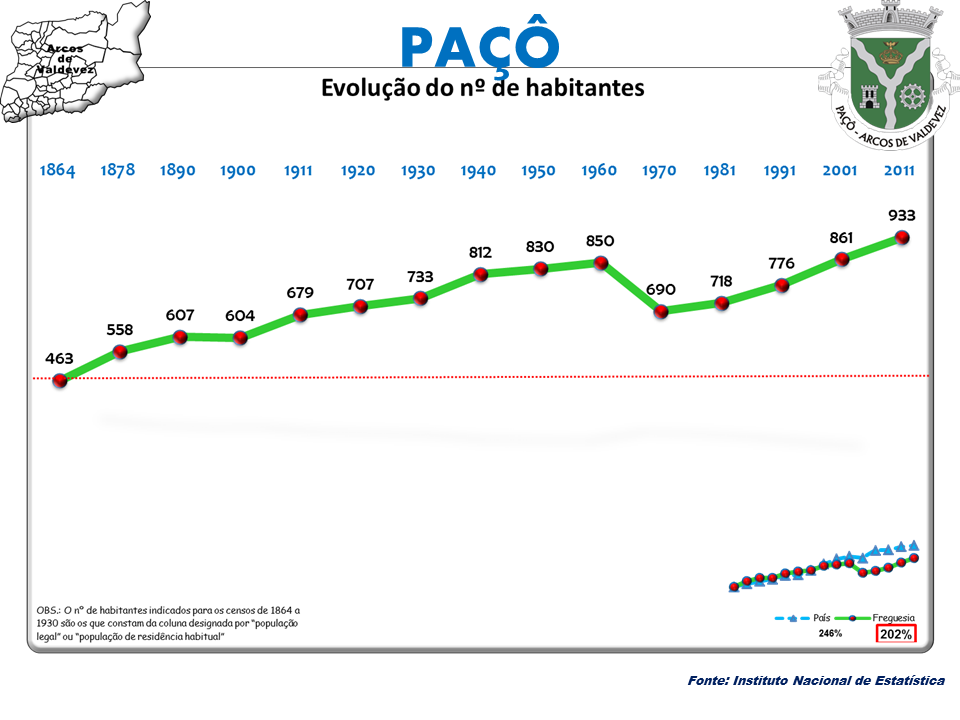 Censos 1864/2011